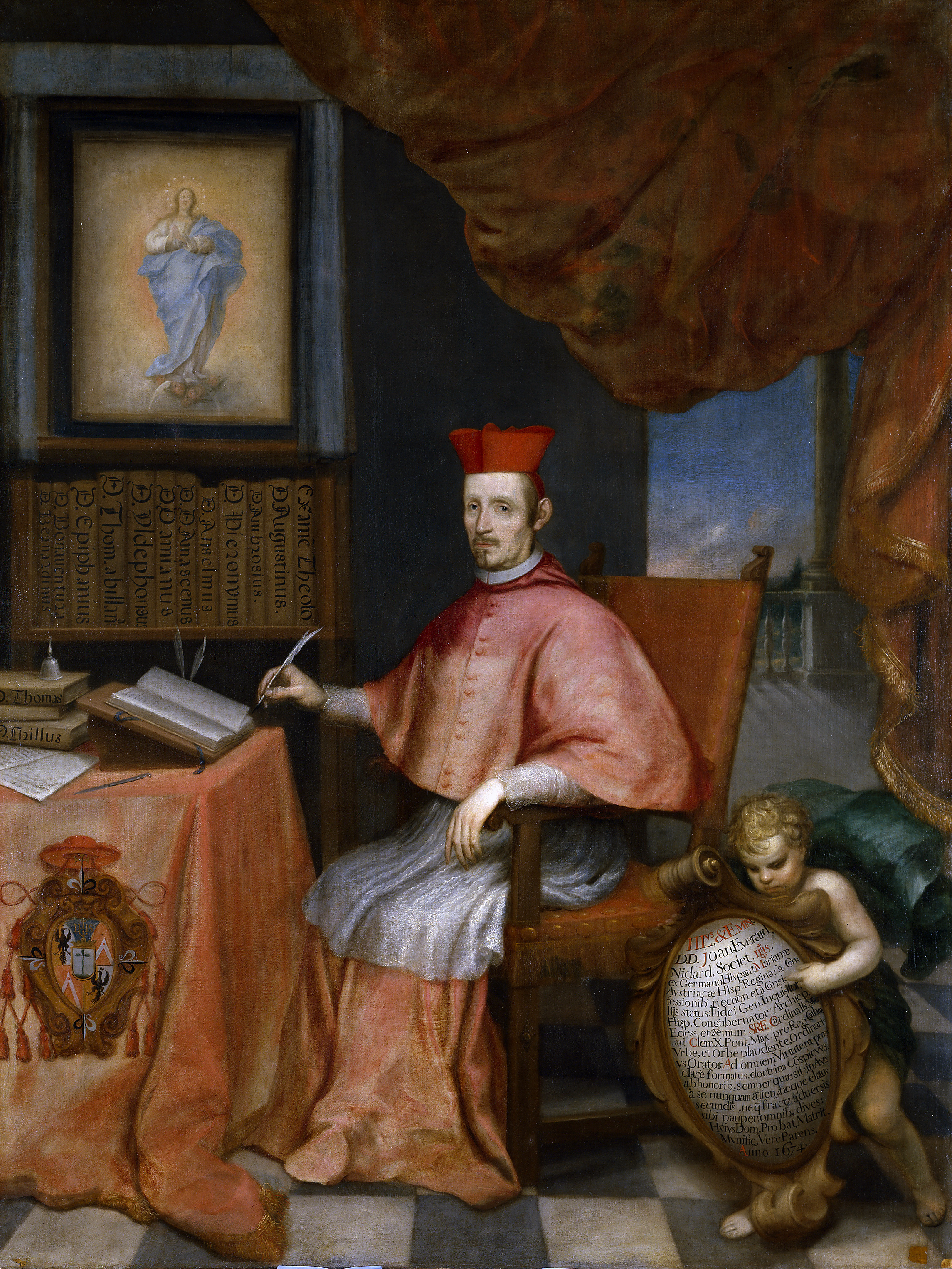 Retrato del cardenal Juan Everardo Nithard (1607-1681), que llegó a ser obispo de Agrigento, cardenal de la Iglesia Católica, arzobispo titular de Edesa, Inquisidor General de España y consejero de la reina Mariana de Austria.